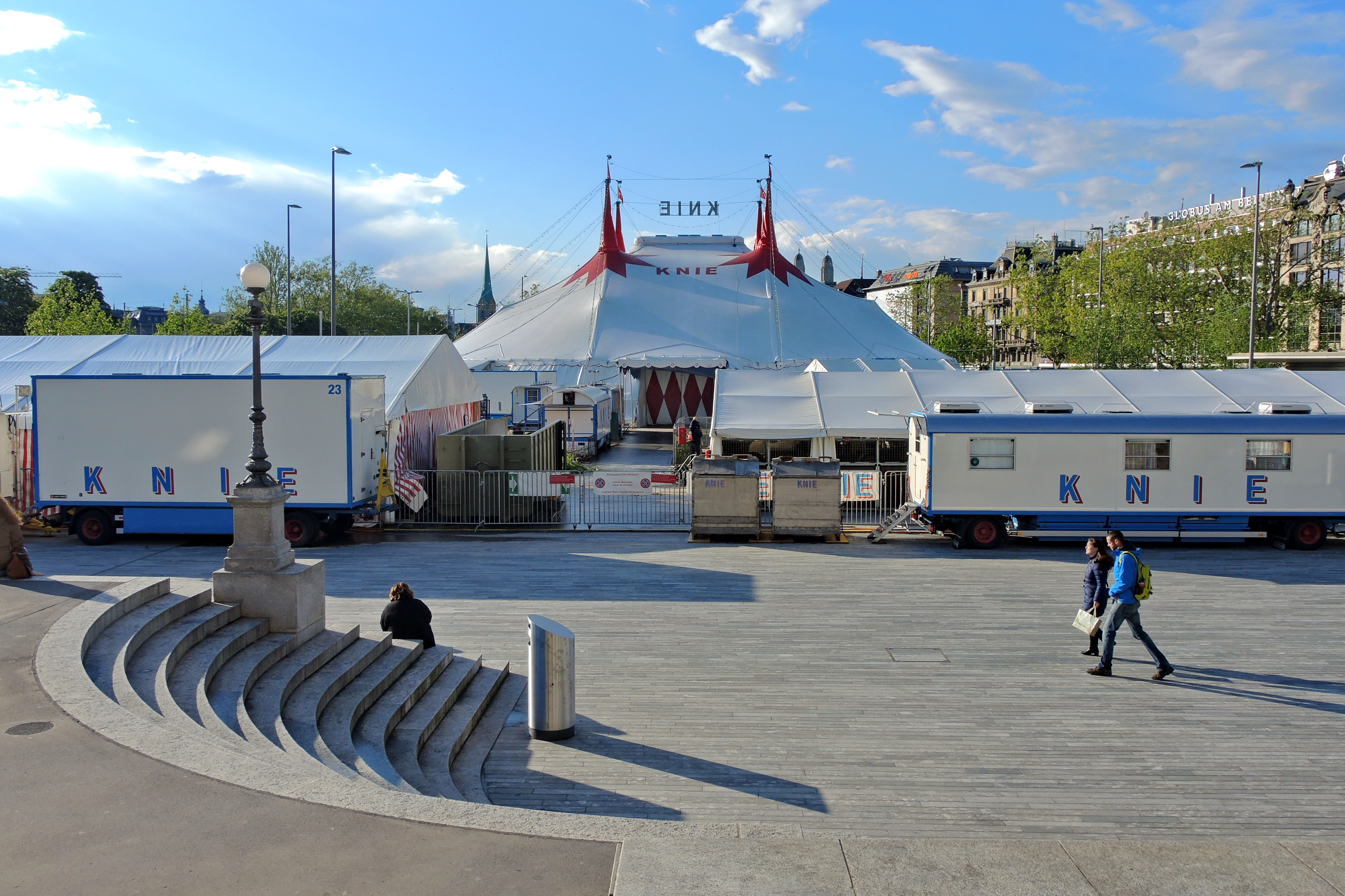 Circus Knie, Sechseläutenplatz in Zürich (Switzerland)